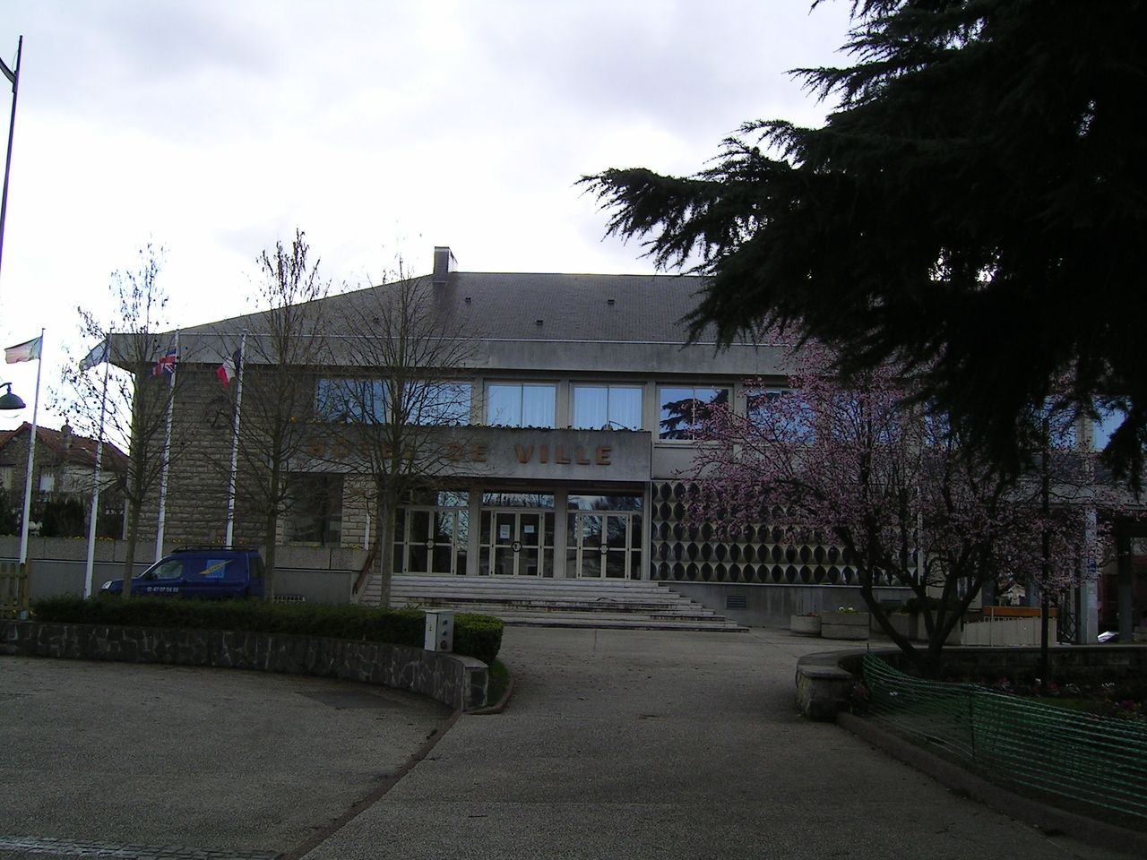 Mairie des Pavillons-sous-Bois Photo personnelle (own work) de Marianna